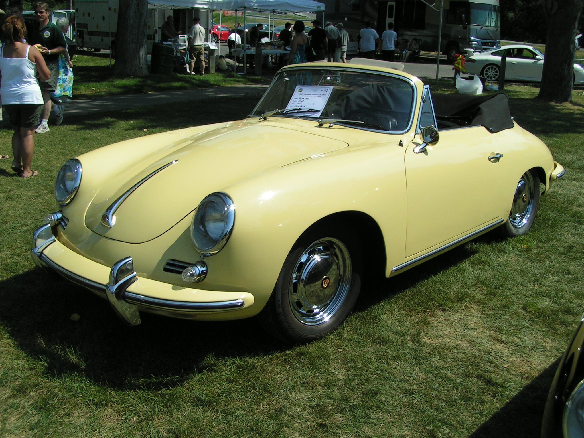 1965 Porsche 356C